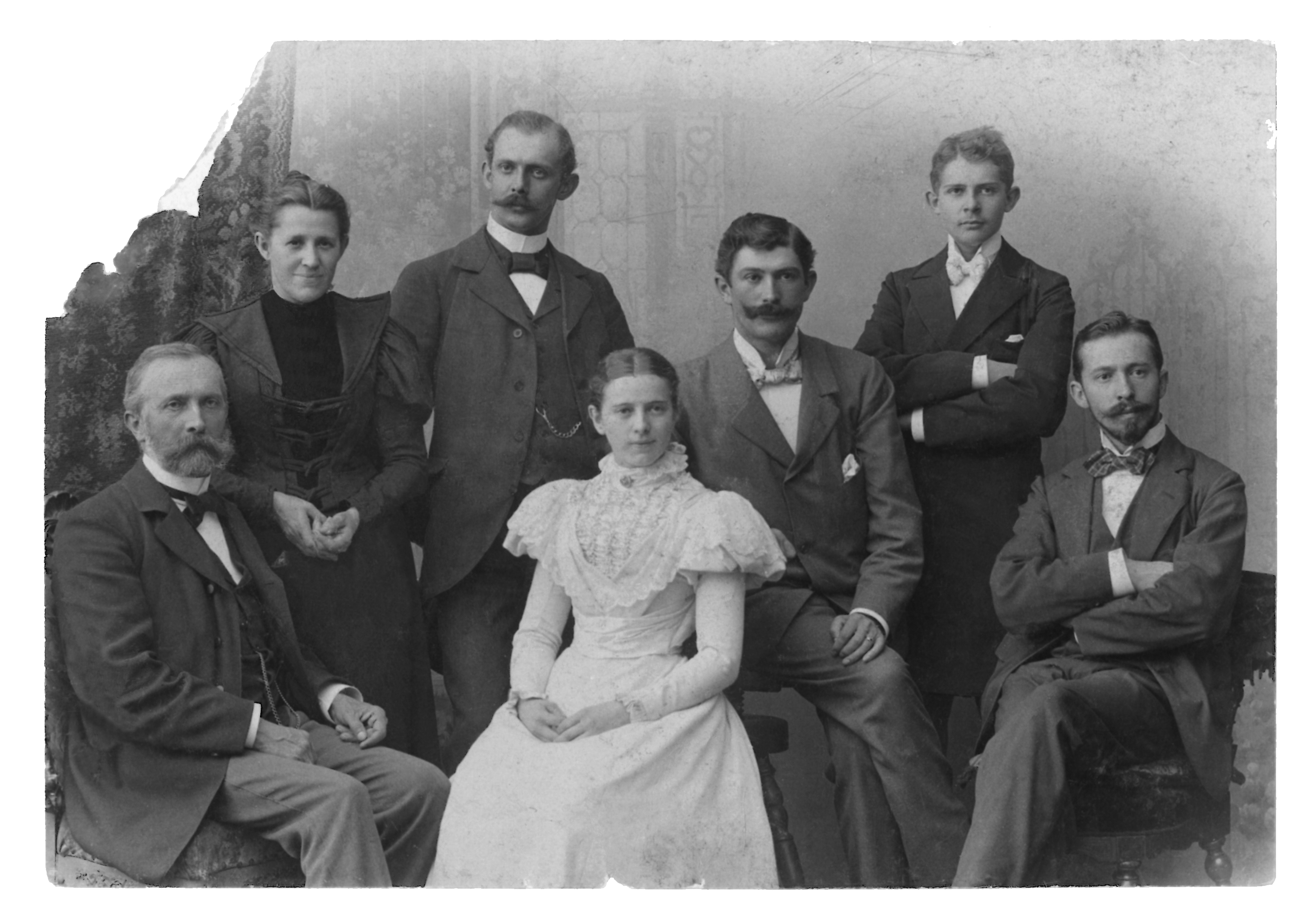 Foto Familie Walter Queck 1900